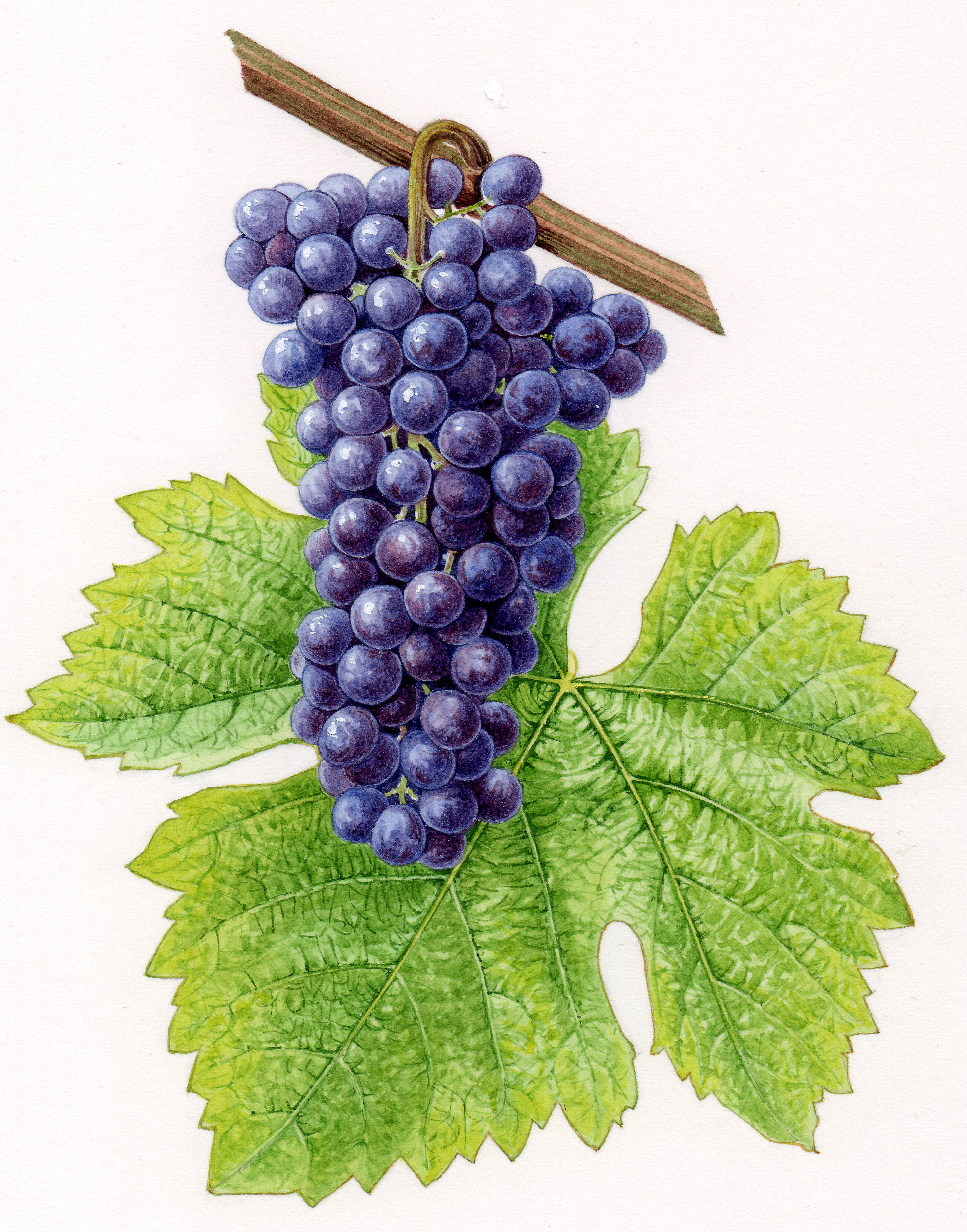 Aquarelle originale pour les Cépages de France (2001)